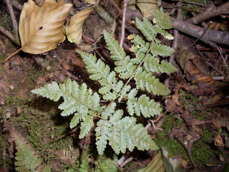 Az égerláp egyik védett növénye, a szálkás pajzsika (Dryopteris carthusiana) (Erdőtelki Égerláp Természetvédelmi Terület, Heves megye)